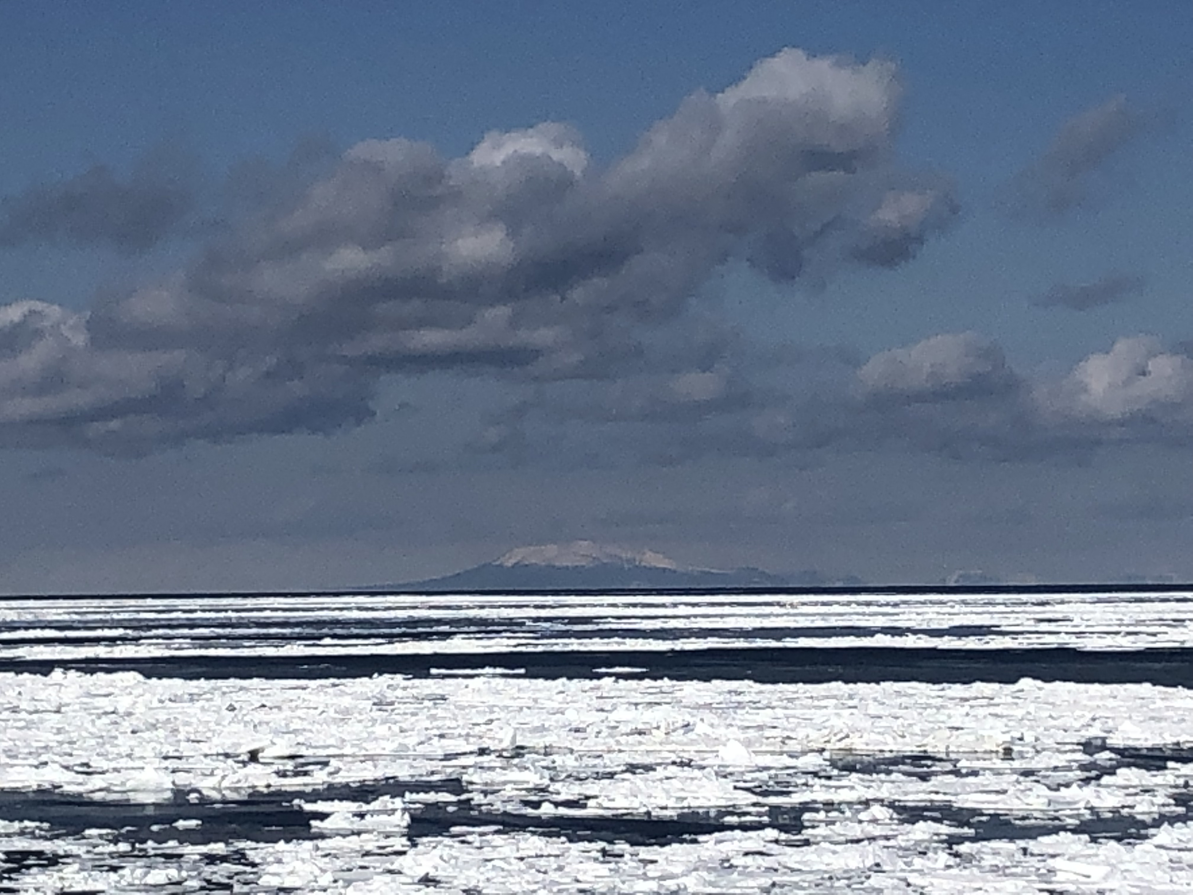 根室市納沙布岬から国後島の羅臼山を撮影した画像。2019年2月13日撮影。